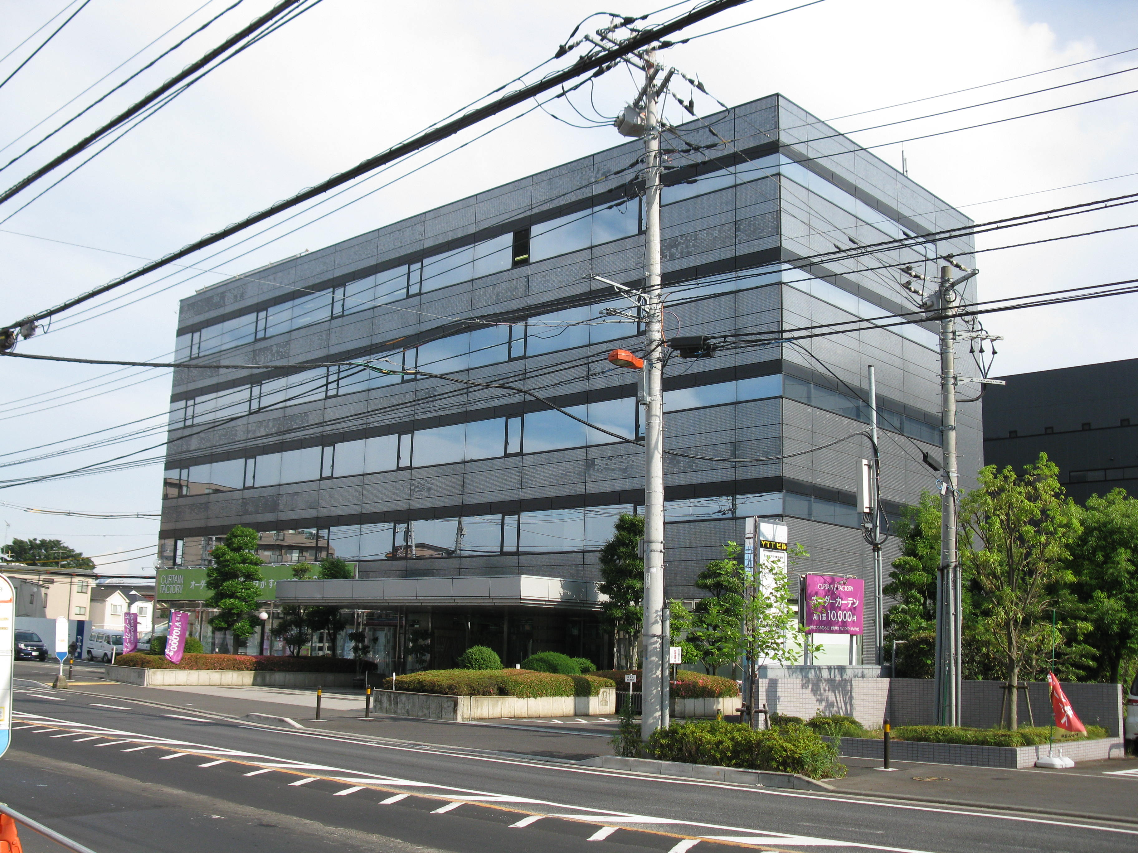 テクネ計測 本社外観写真